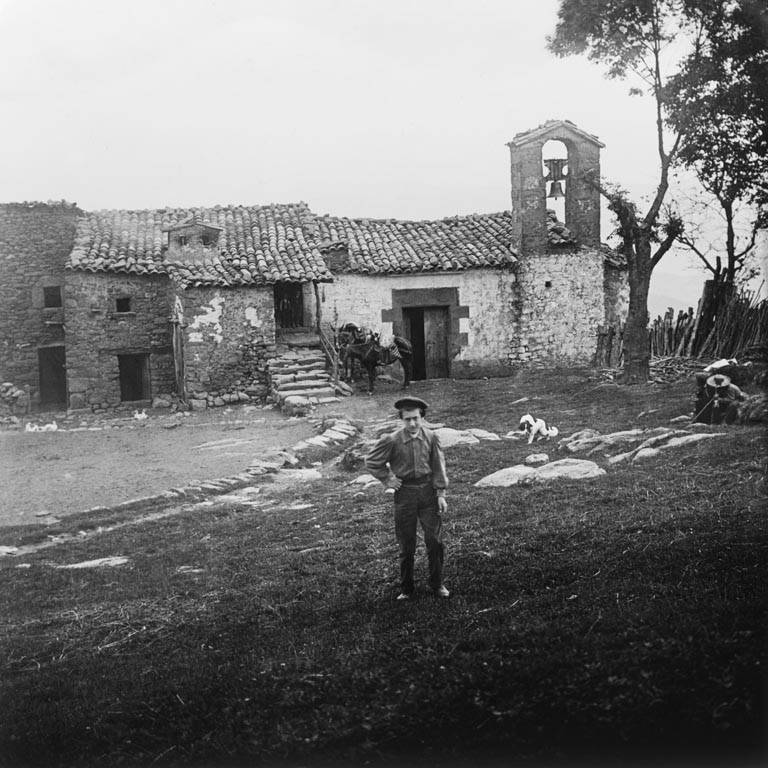 Santa Magdalena del Mont, a la Vall d'en Bas. Cèsar August Torras i Ferreri (ca. 1910) This is a a photo of a natural area in Catalonia, Spain, with id: ES510199